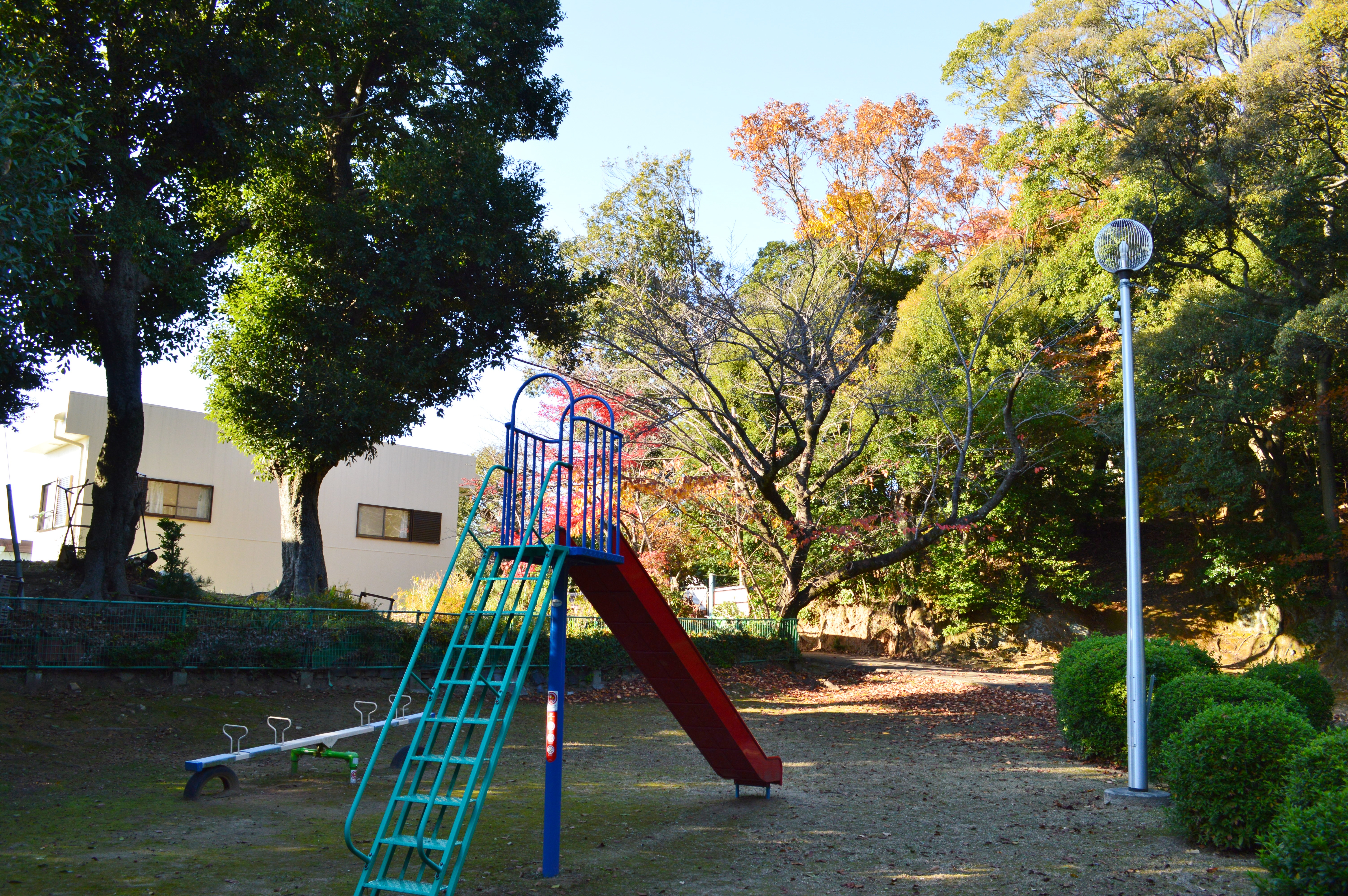 甲山1号墳 (右) と甲山2号墳 (左) (岡崎市)